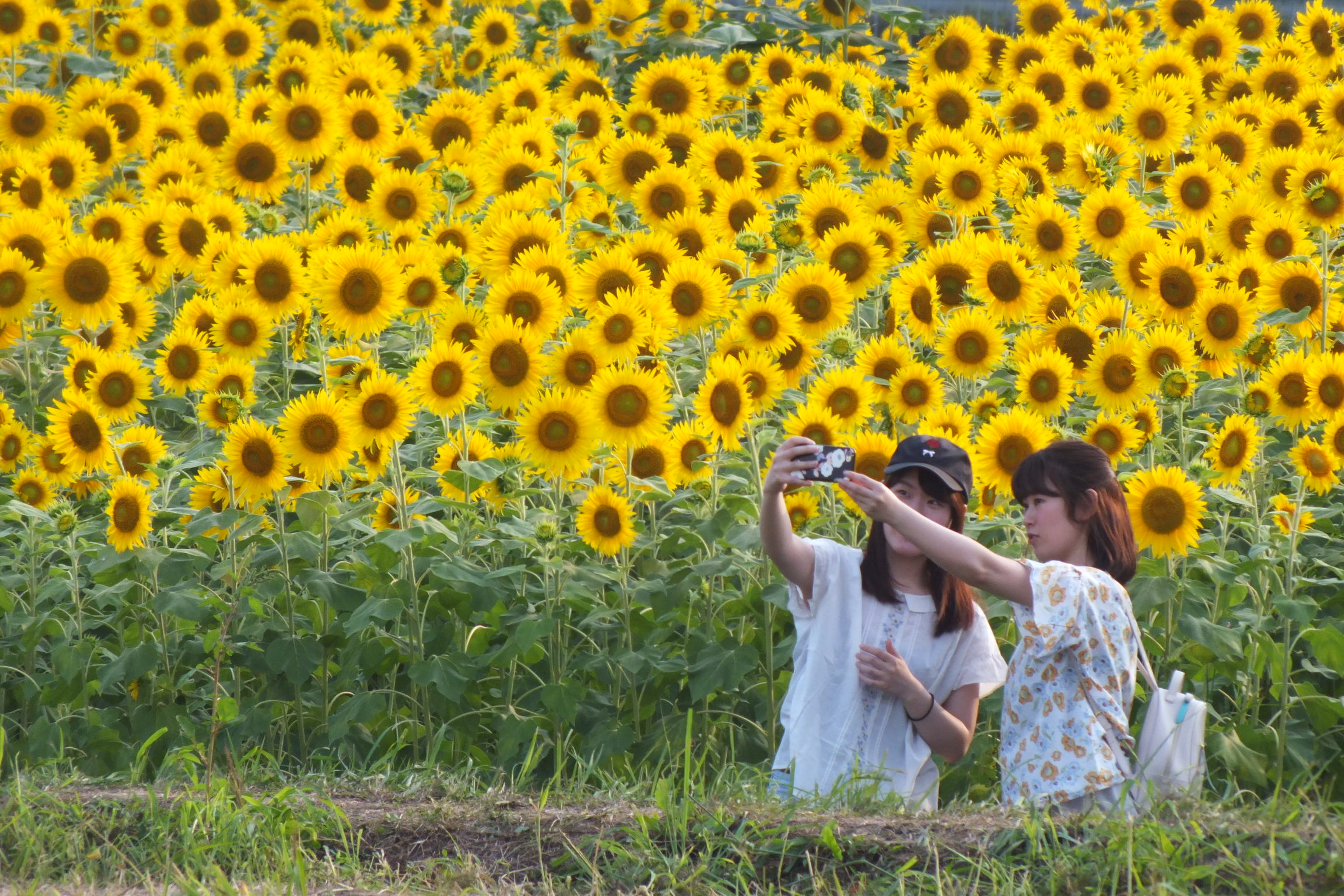 2017-07-15 Ono-himawarino-oka-park (小野市立ひまわりの丘公園)